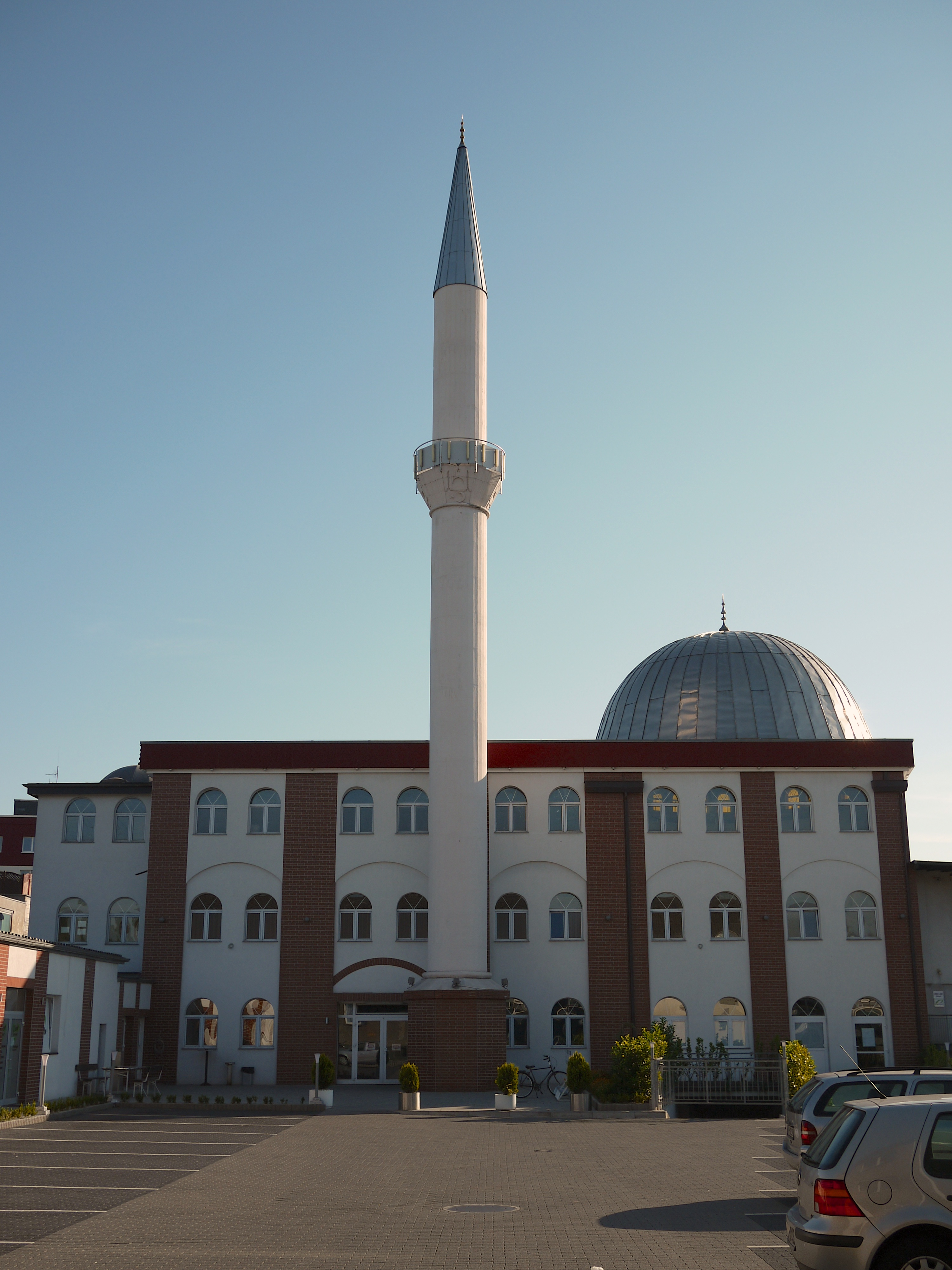 Fatih-Moschee, Sandstraße 126, Mülheim an der Ruhr